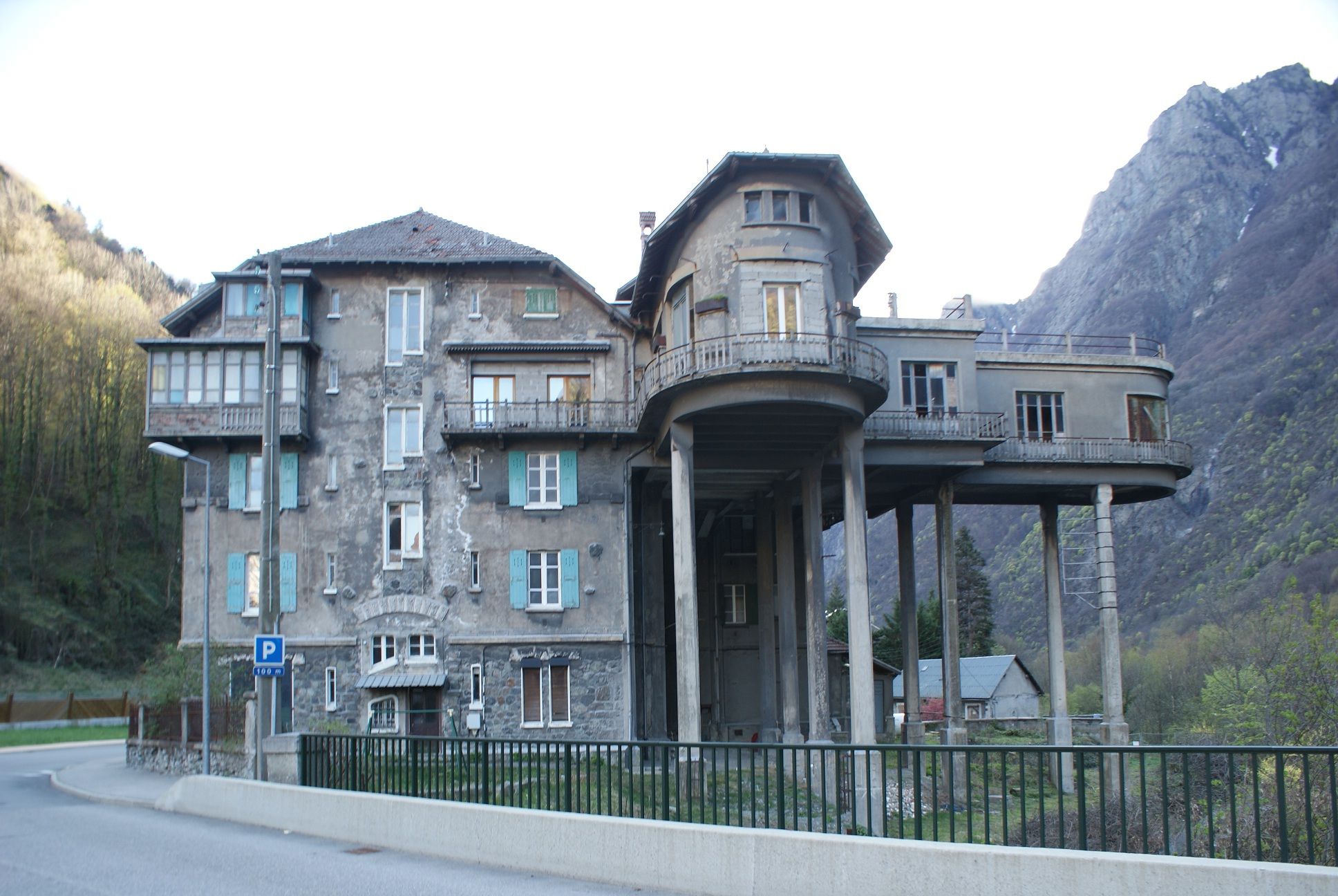 Pavillon Keller et Leleu